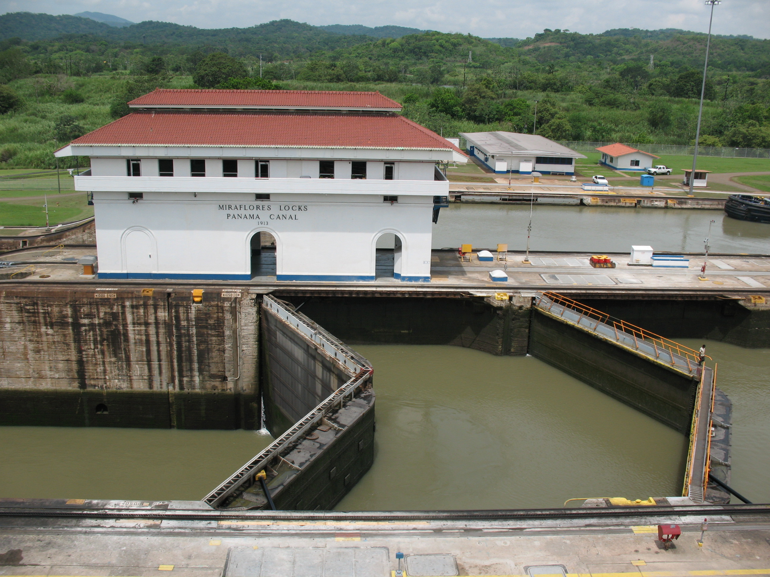 Esclusas de Miraflores del Canal de Panamá